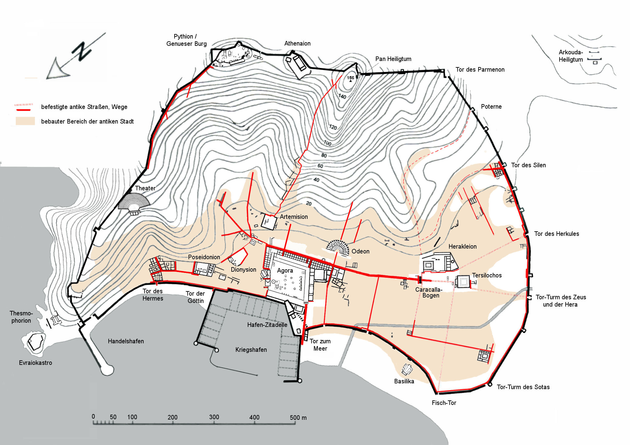 Skizze der antiken Stadt Thasos mit der sie umfassenden Stadtmauer